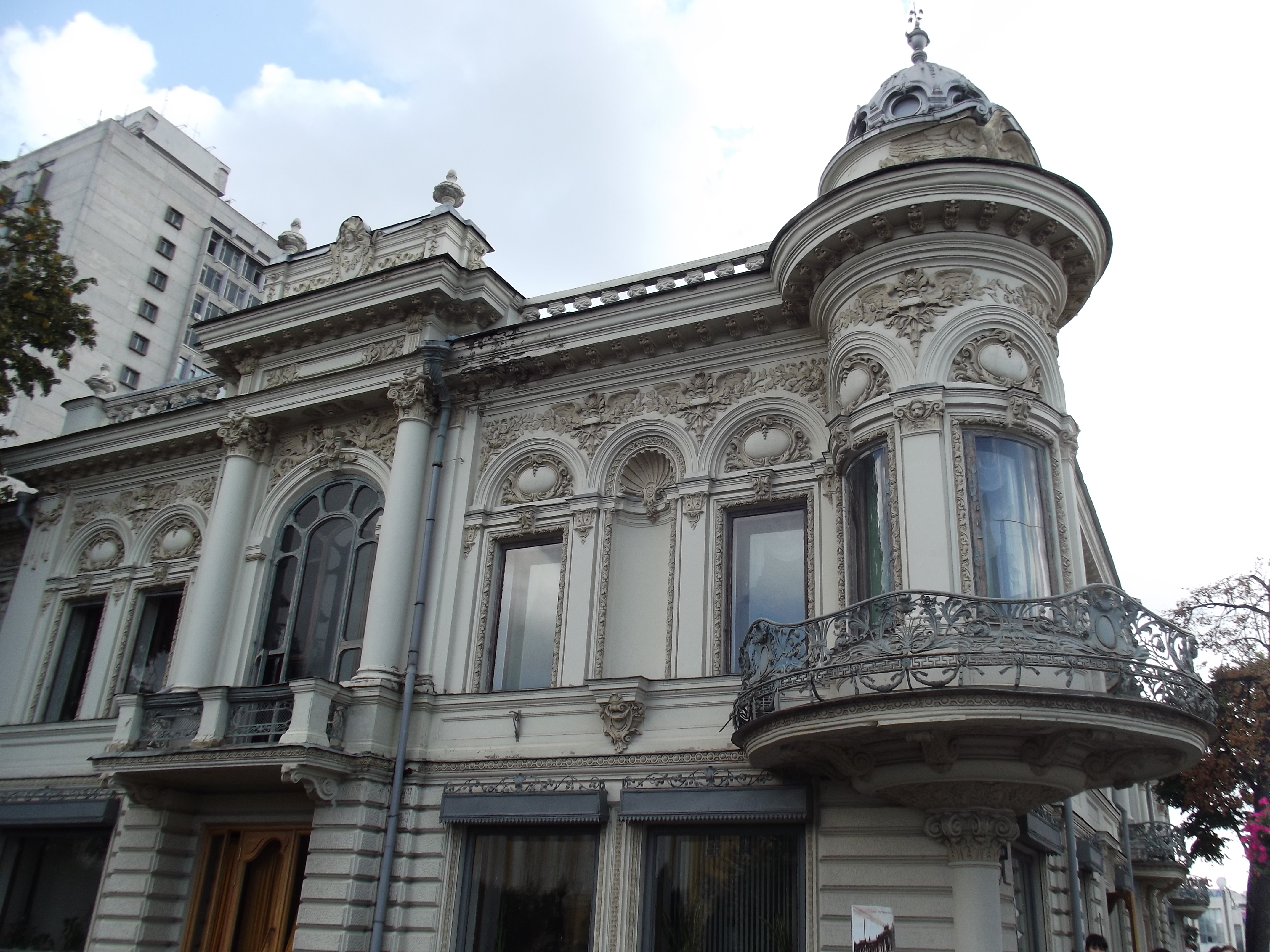 Дом Ушковой З. Н. (с интерьером) (Республика Татарстан, Казань, Кремлевская улица, 33)